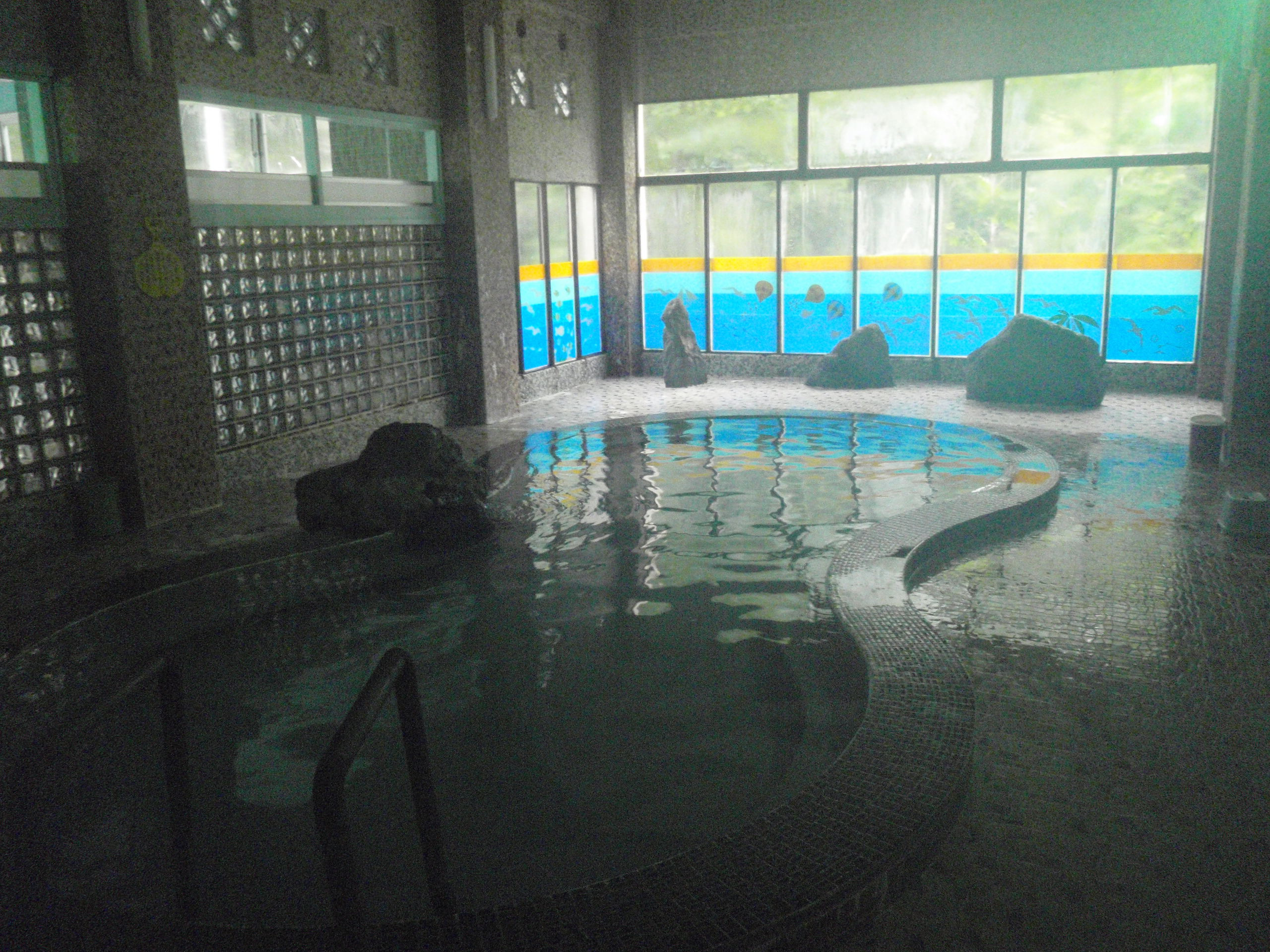 セトセ温泉ホテル浴室